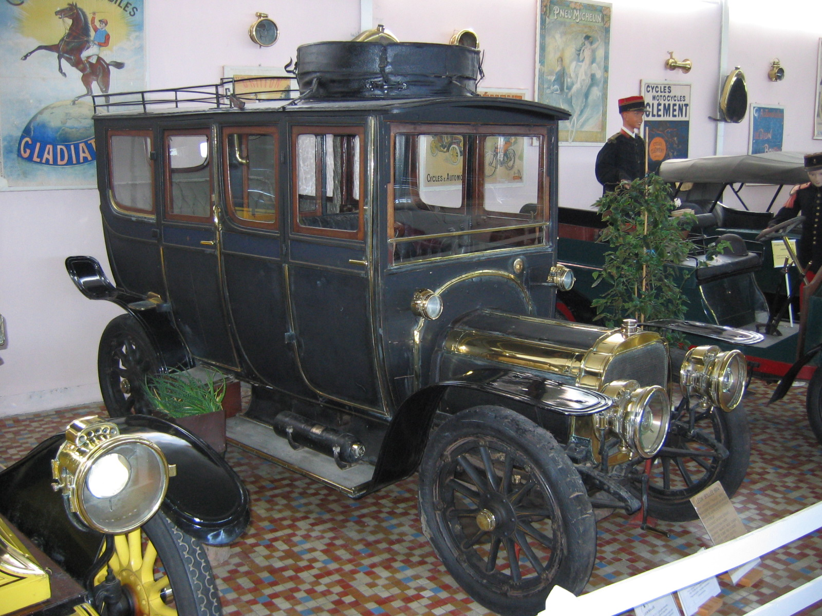 Léon Bollée 1904 20 HP 7 seats 4 cylinders 11 units (10 in the USA, 1 in France) Musée automobile de Vendée Picture Gérard Delafond